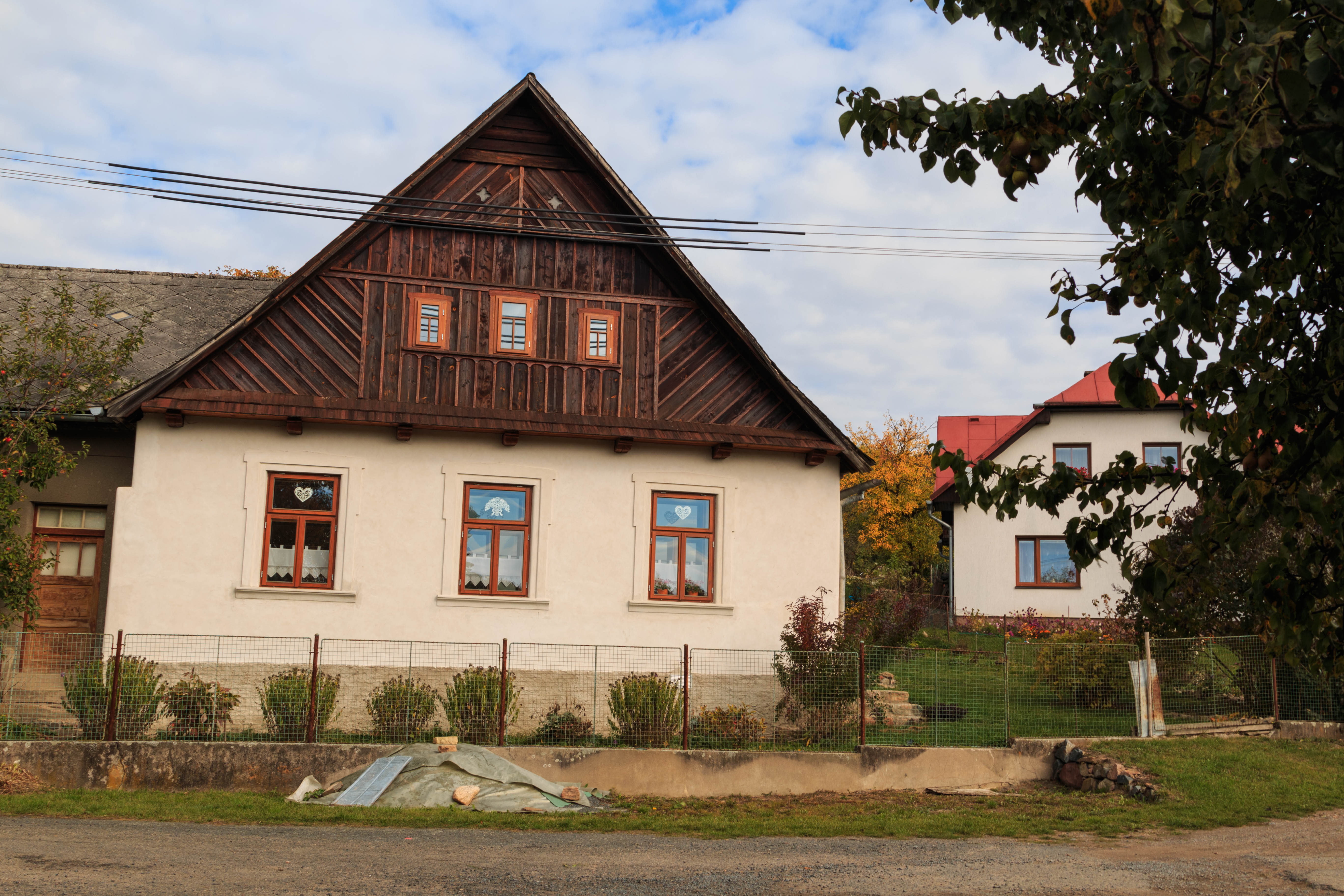 Lhůta čp. 22